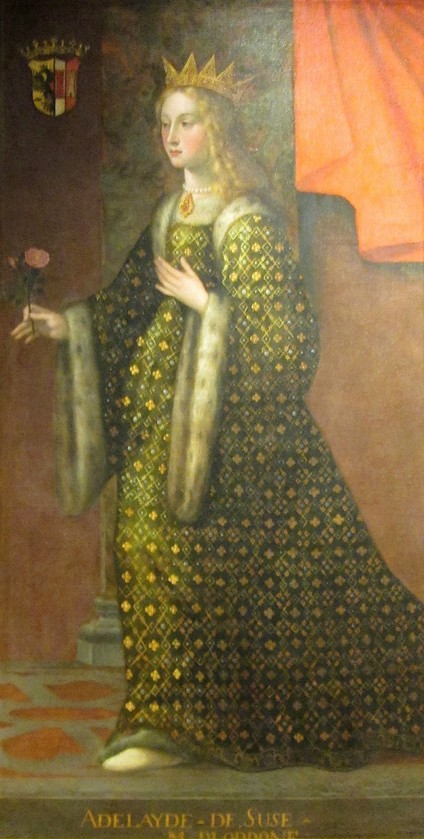 Ritratto di Adelaide di Susa moglie di Oddone, conservato nella Reggia di Venaria Reale (18th century)